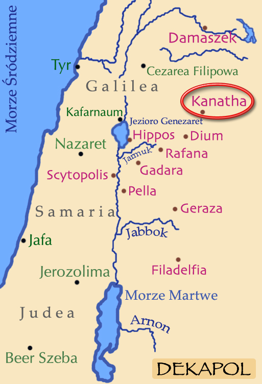 Mapka Dekapolu z zaznaczoną Kanatą.